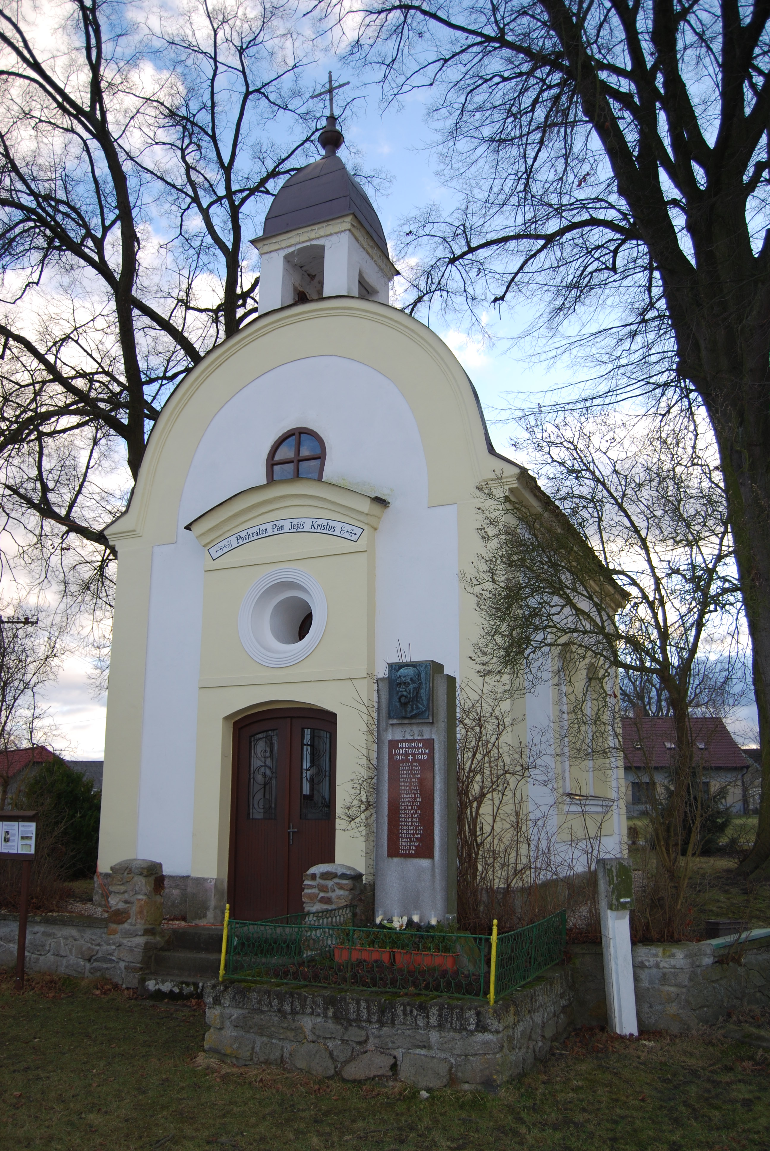 Kaple v obci zasvěcená Panně Marii. Křenovice. Okres Písek. Česká republika.